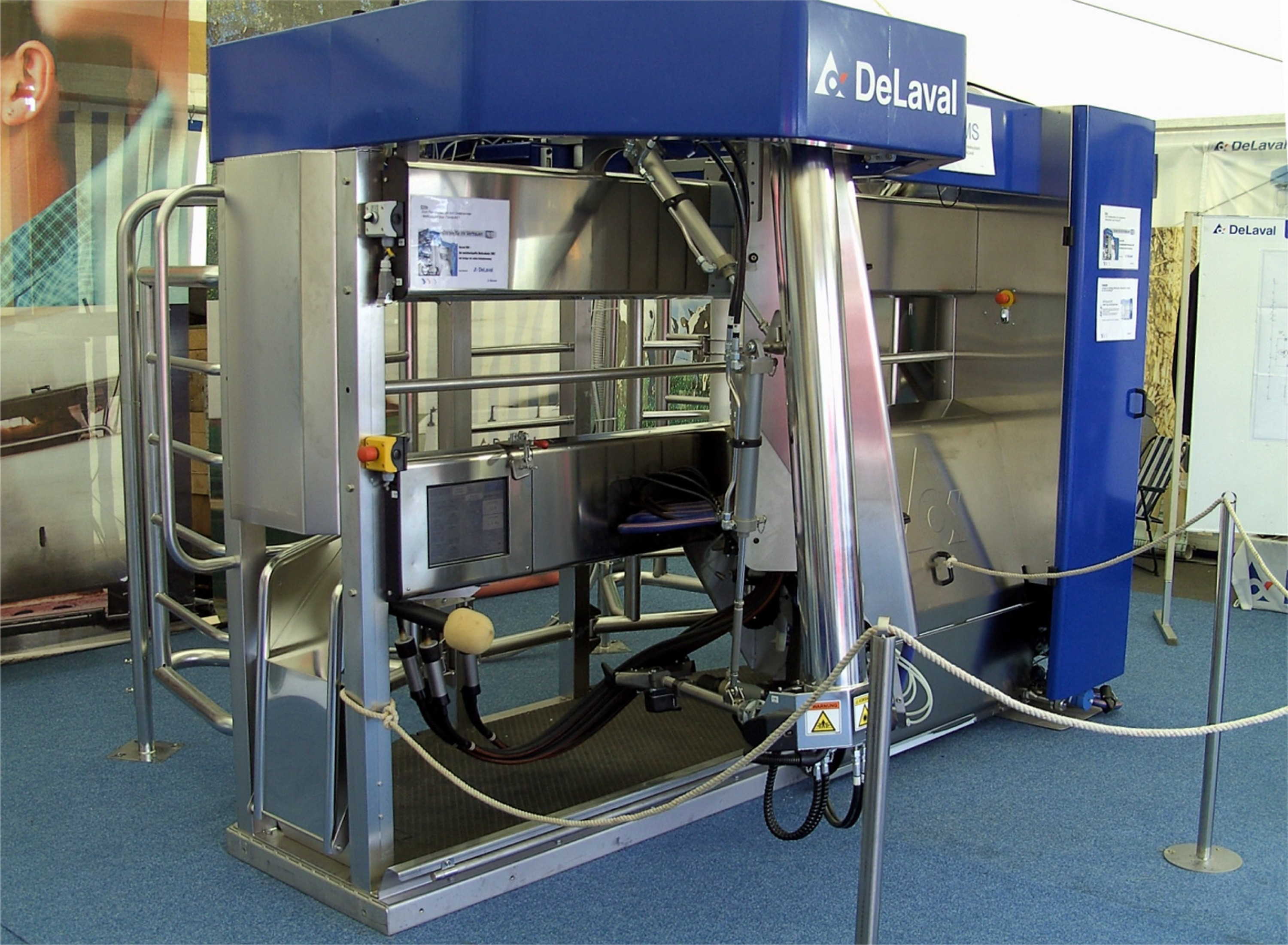 VMS, ein automatisches Melksystem vom schwedischen Hersteller DeLaval.